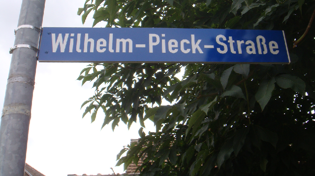 Straßenschild in der Gemeinde Oßmannstedt